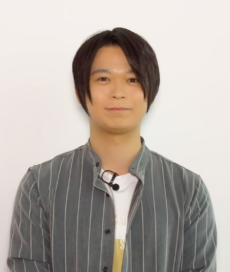 土岐隼一（声優）